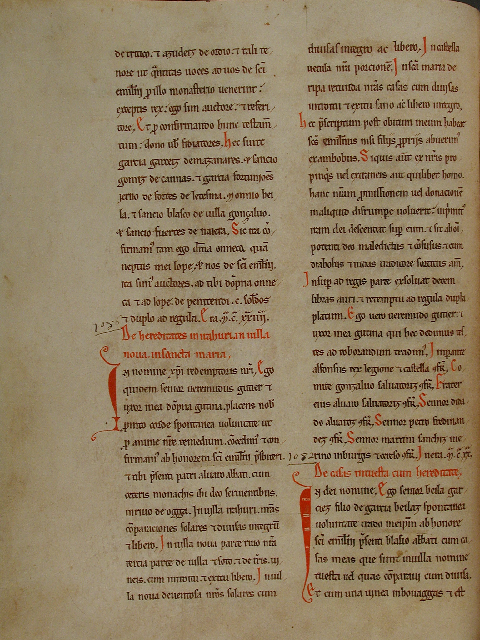 Se trata de una de las páginas del Becerro Galicano de San Millán de la Cogolla fechada en el año 1082. En ella se menciona a La Rioja como "Rivo de Ogga"